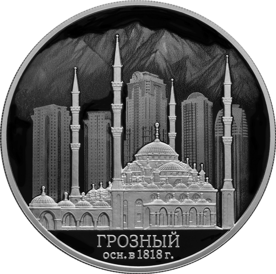 Монета Банка России, 200-летие основания г. Грозного. 3 рубля, серебро, реверс, пруф. Изображение мечети «Сердце Чечни» на фоне комплекса высотных зданий «Грозный-Сити» и гор, внизу — надпись в две строки: «ГРОЗНЫЙ осн. в 1818 г.». Чеканка — Санкт-Петербургский монетный двор. Художники: М.П. Титов, О.Г. Шепель. Скульптор: М.П. Титов.